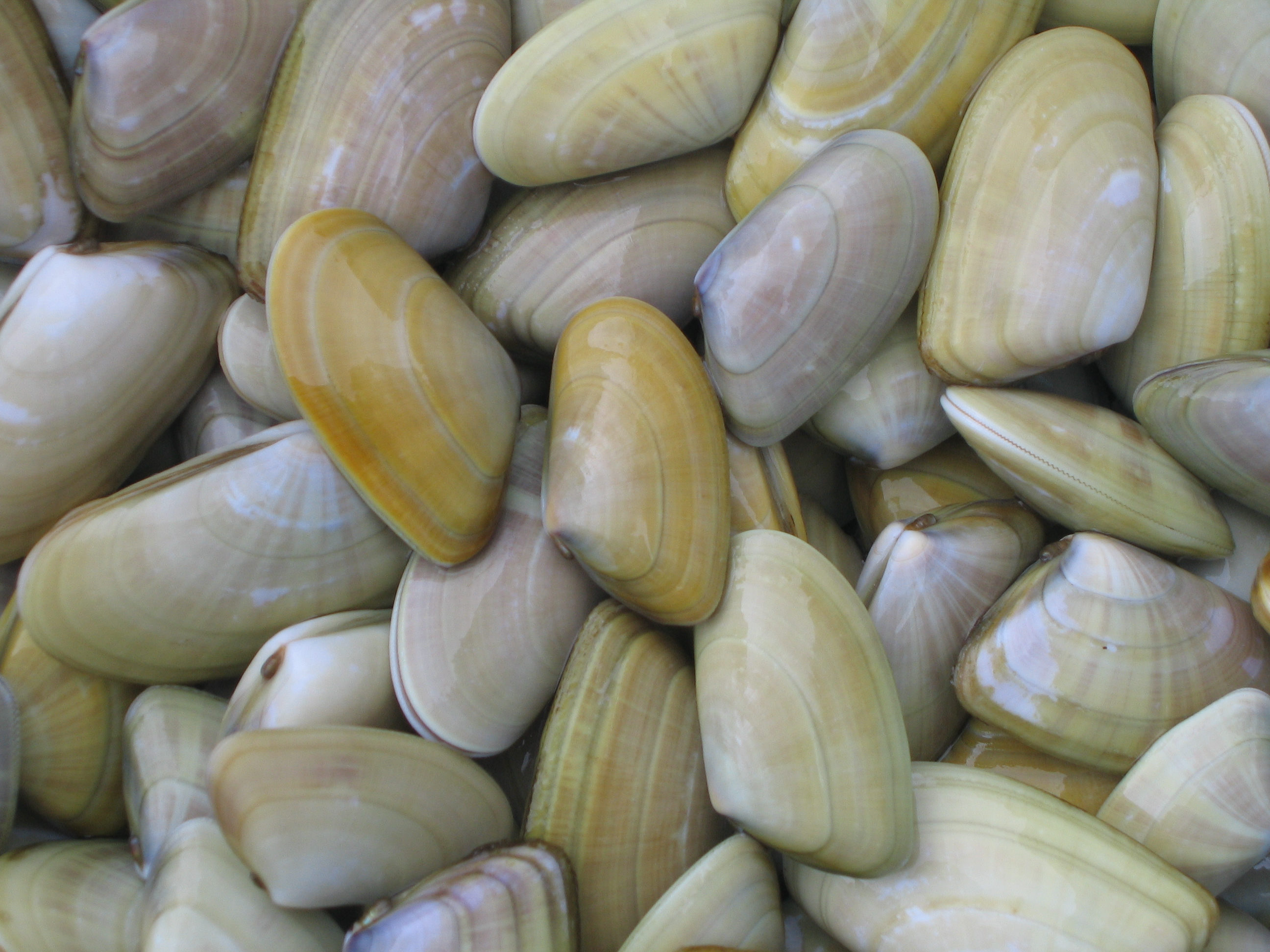 Tellines provenant du Finistère - France.